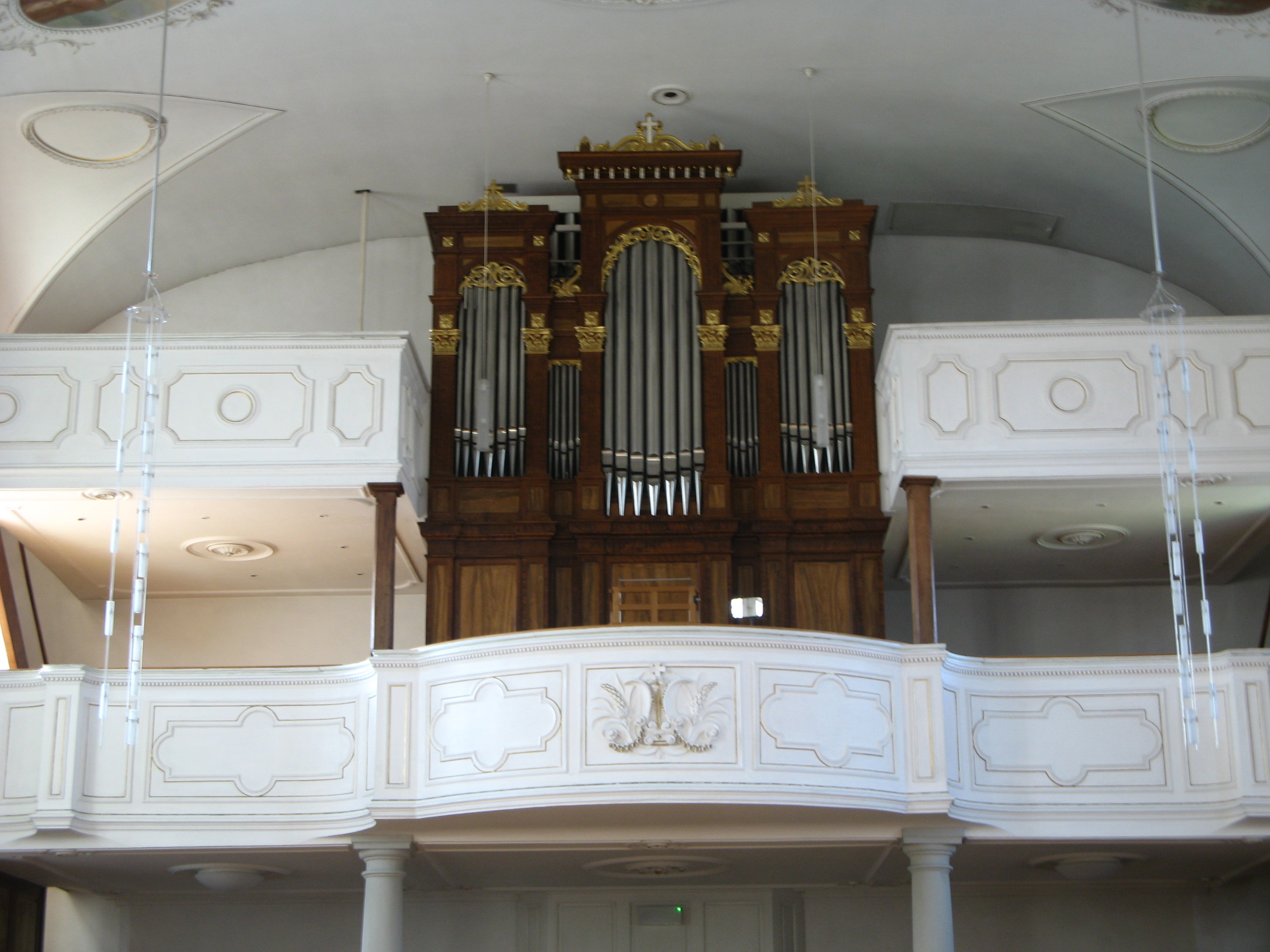 Kirche St. Burkhard in Beinwil (Freiamt), Empore mit Orgel